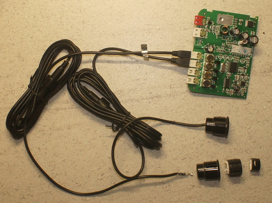 Частично разобранный парктроник. Нижний сенсор разобран, видны пластиковый стакан, резиновый демпфер и металлическая излучающая головка с пьезоэлементом внутри.